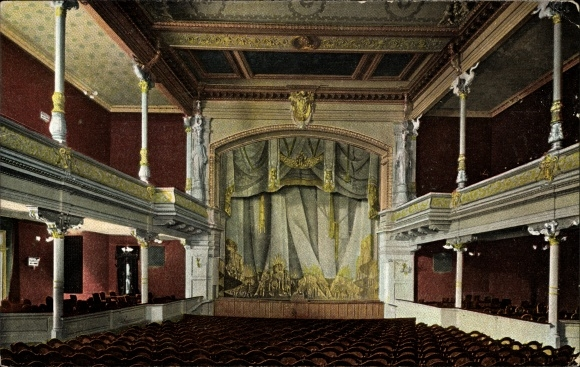 Berlin, Große Frankfurterstraße 132, Rose-Theater, Blick auf die Bühne